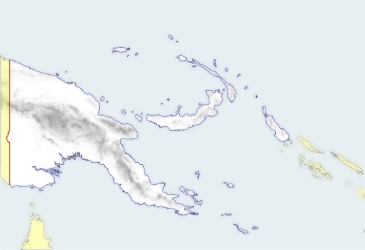 Paapua Uus-Guinea asendi kaart